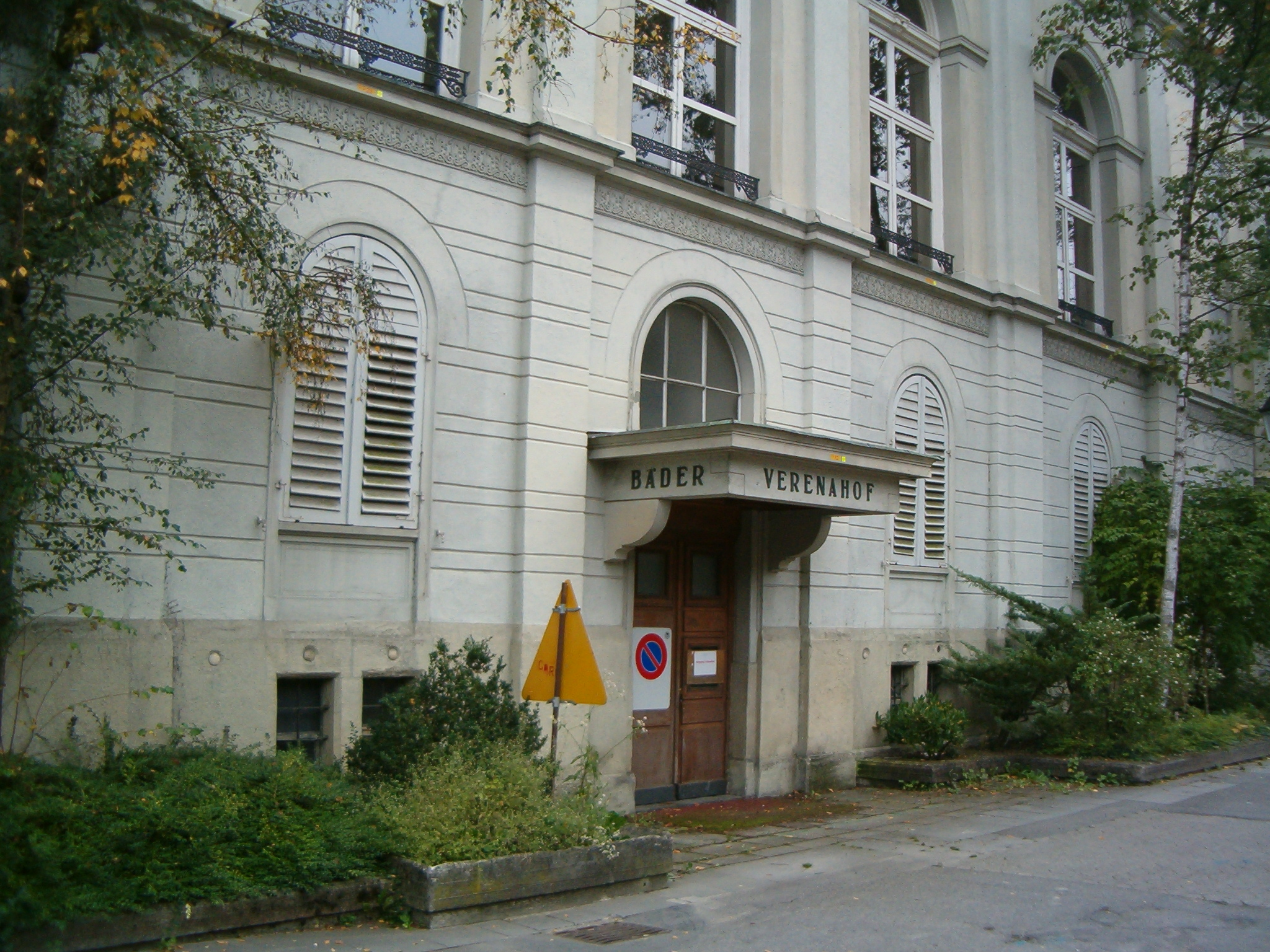 Verenahof, Bädereingang